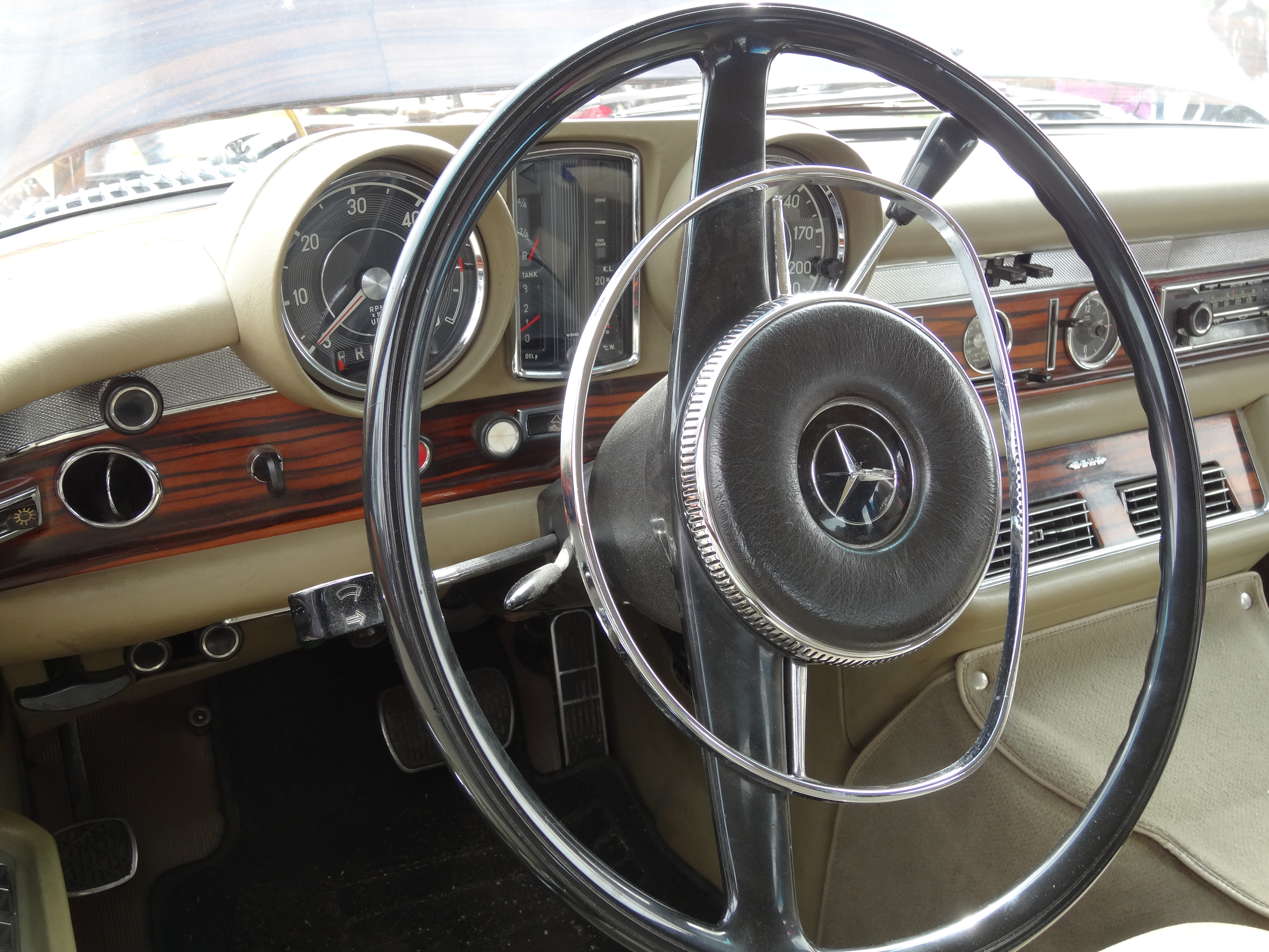 Impressionen vom ersten Classic Motor Day auf dem ehemaligen Flugplatz Hungriger Wolf in Hohenlockstedt.